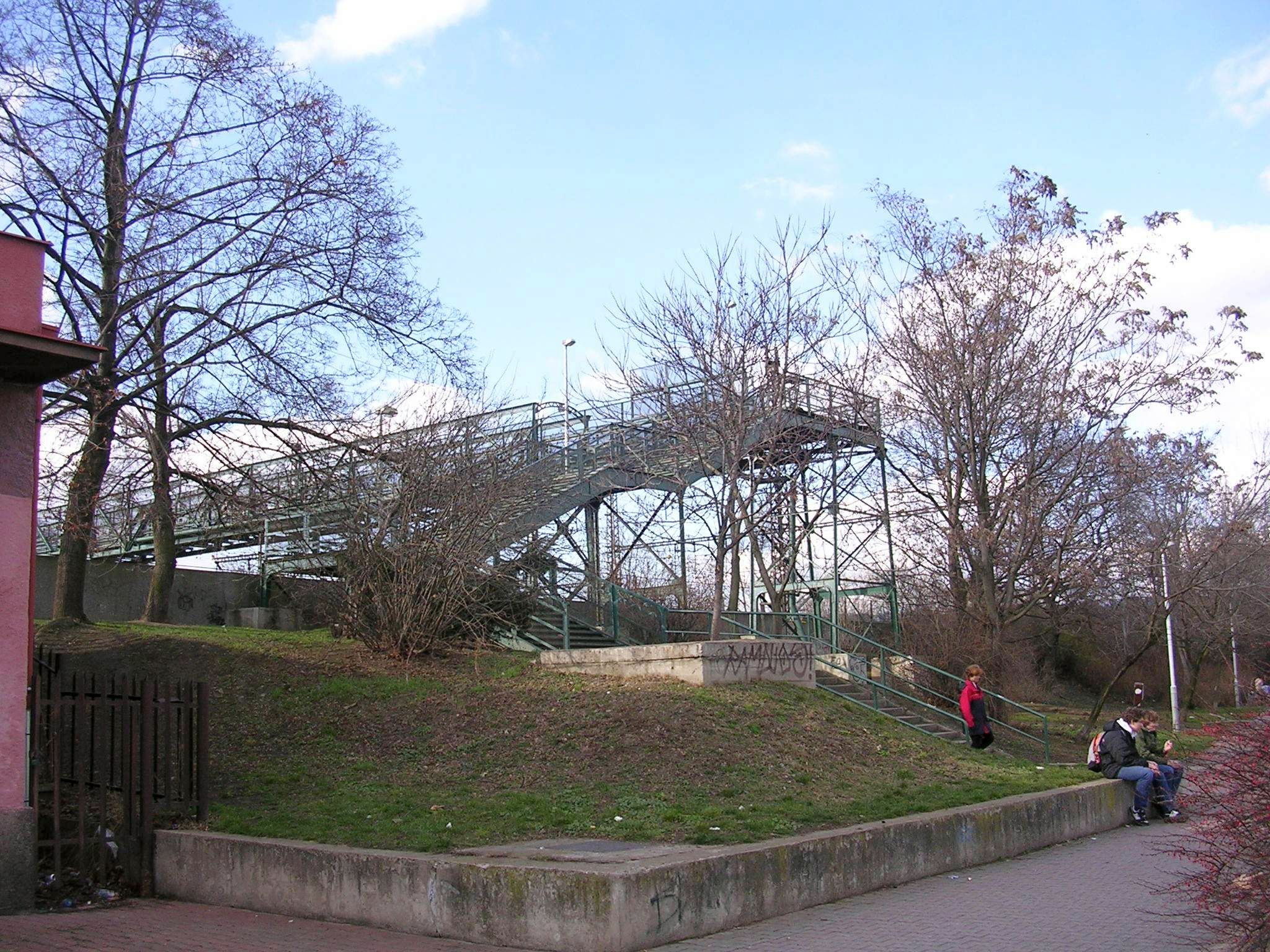 Praha, Smíchov, lávka přes Smíchovské nádraží, východní věž